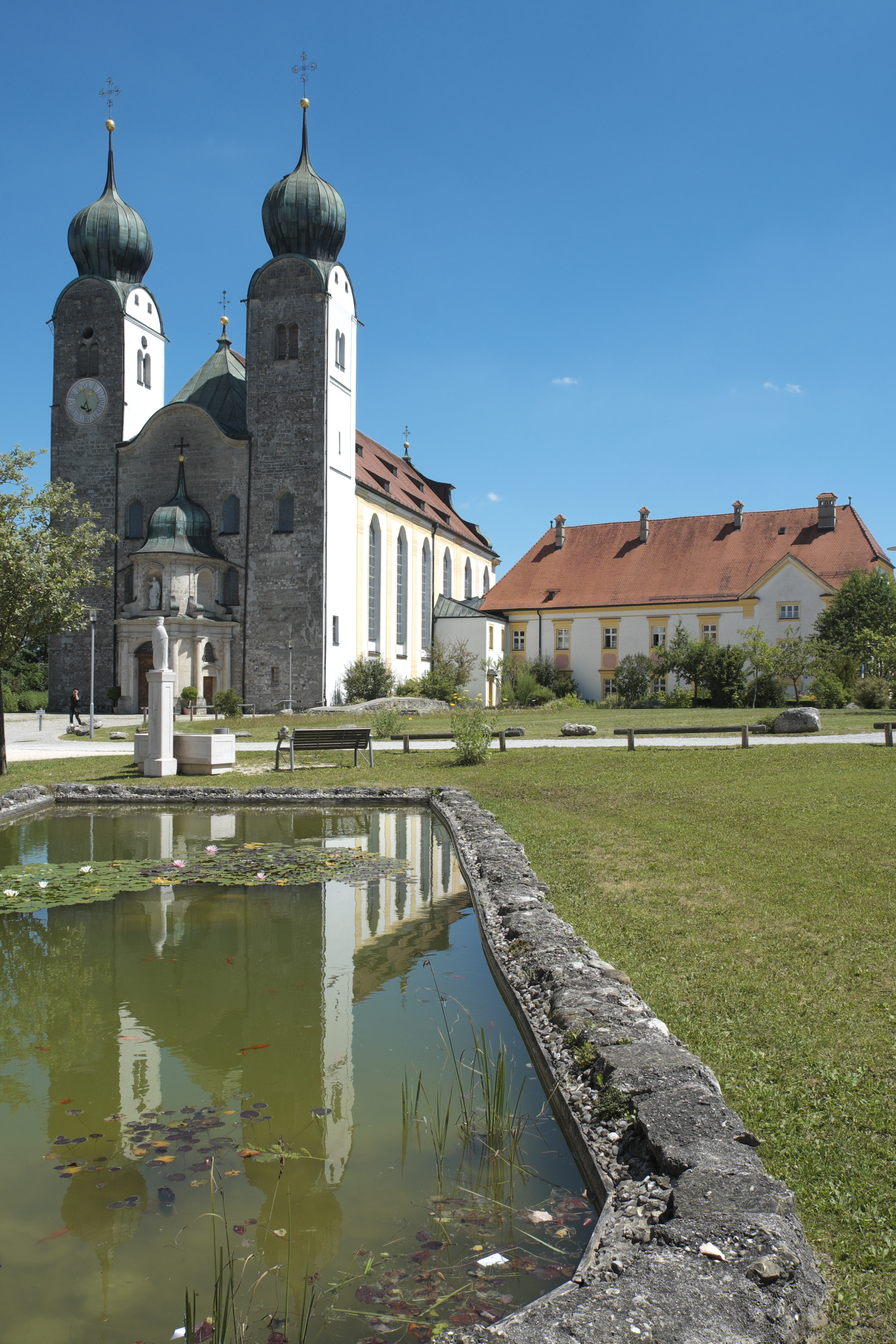 Ehemalige Augustiner-Chorherrenstiftskirche St. Margaretha in Baumburg an der Alz, einem Ortsteil von Altenmarkt an der Alz im Landkreis Traunstein (Bayern/Deutschland)